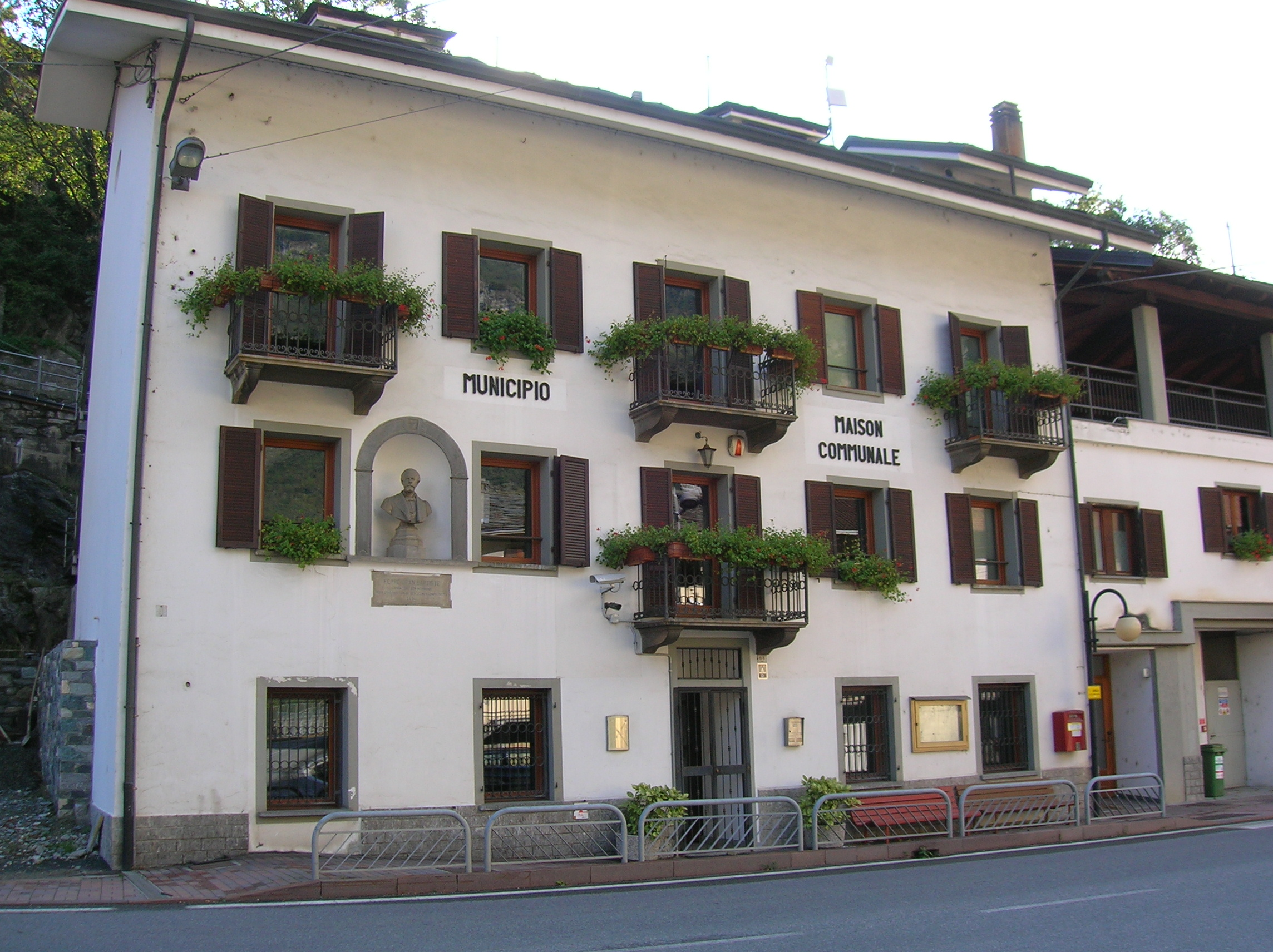 municipio di Montjovet, Valle d'Aosta, Italia.